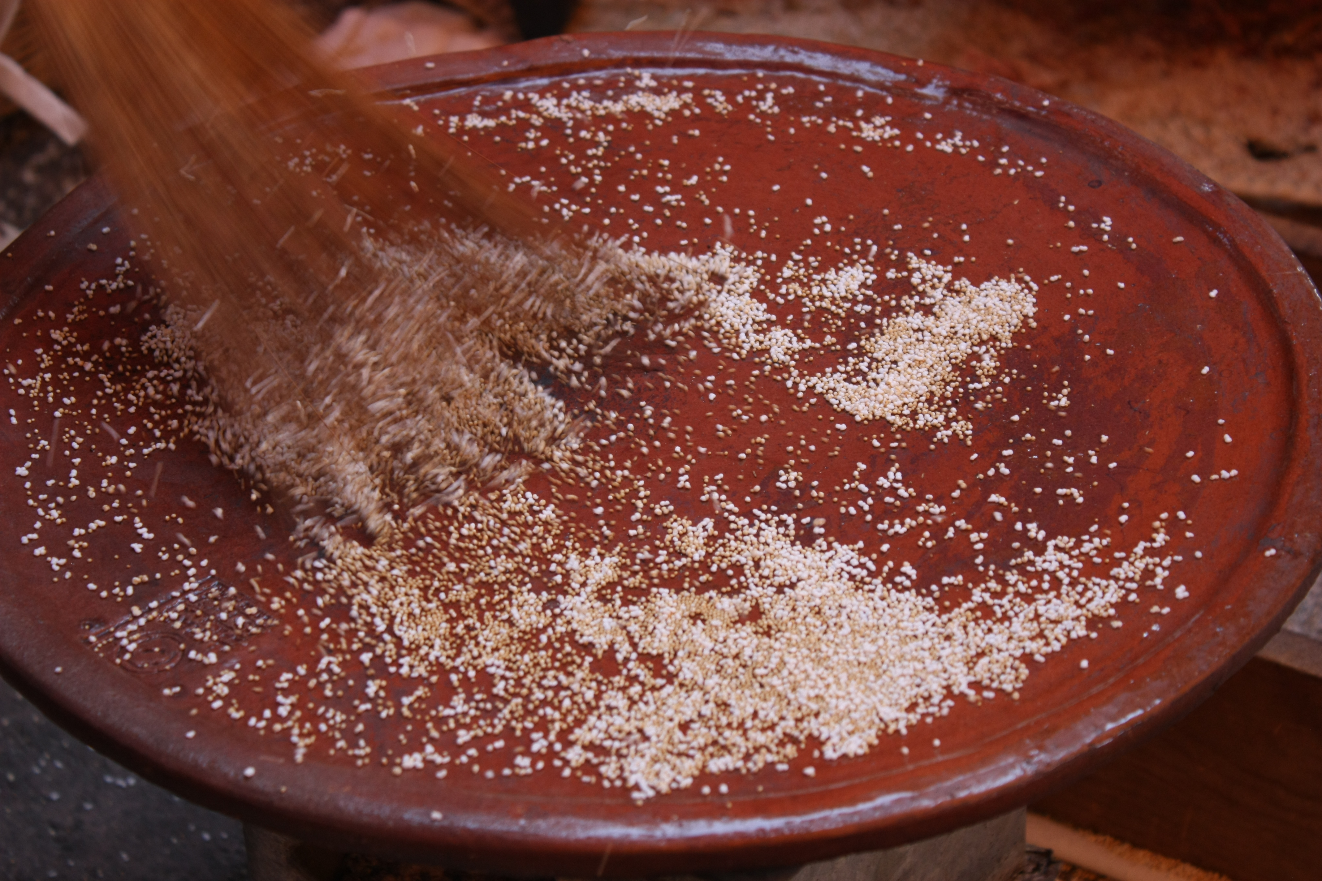 Tostando amaranto en comal de barro